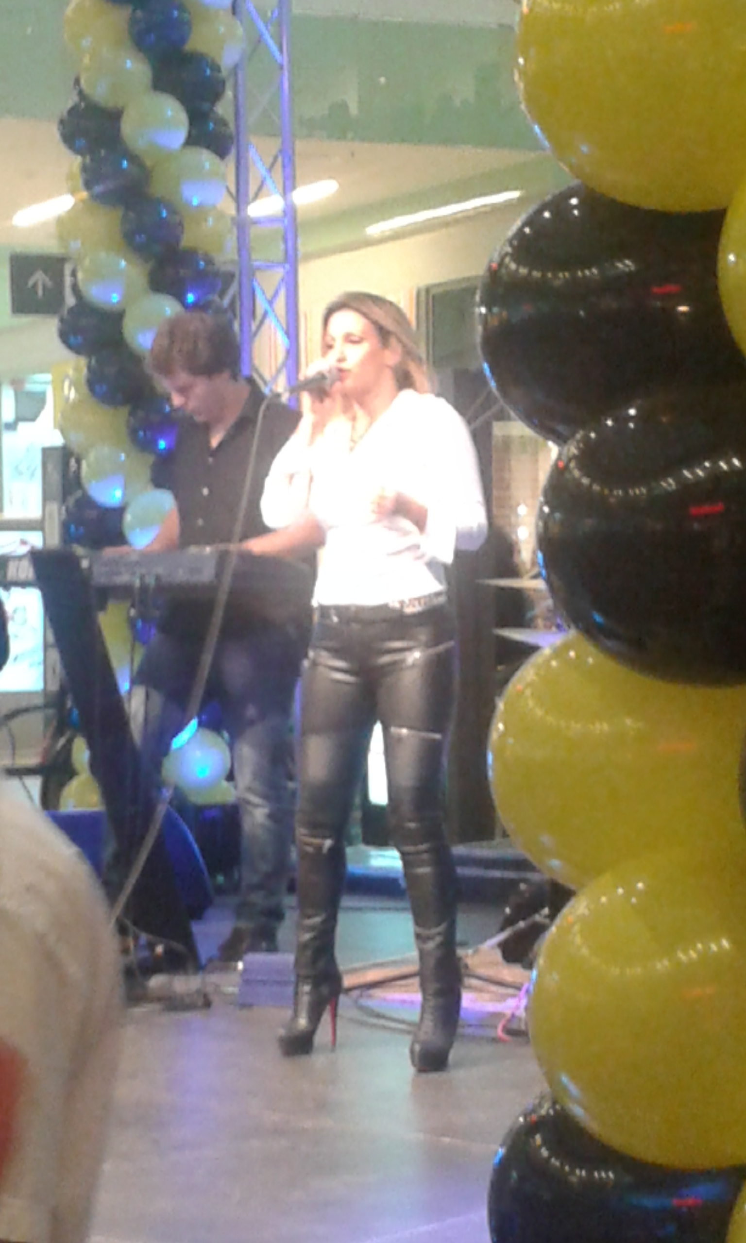 Ана Кокић на концерту у крагујевачком тржном центру „Плаза“. Наступ је уприличен у 20.30 у петак, 7. новембра 2014, у оквиру манифестације Grazia Shopping Night.